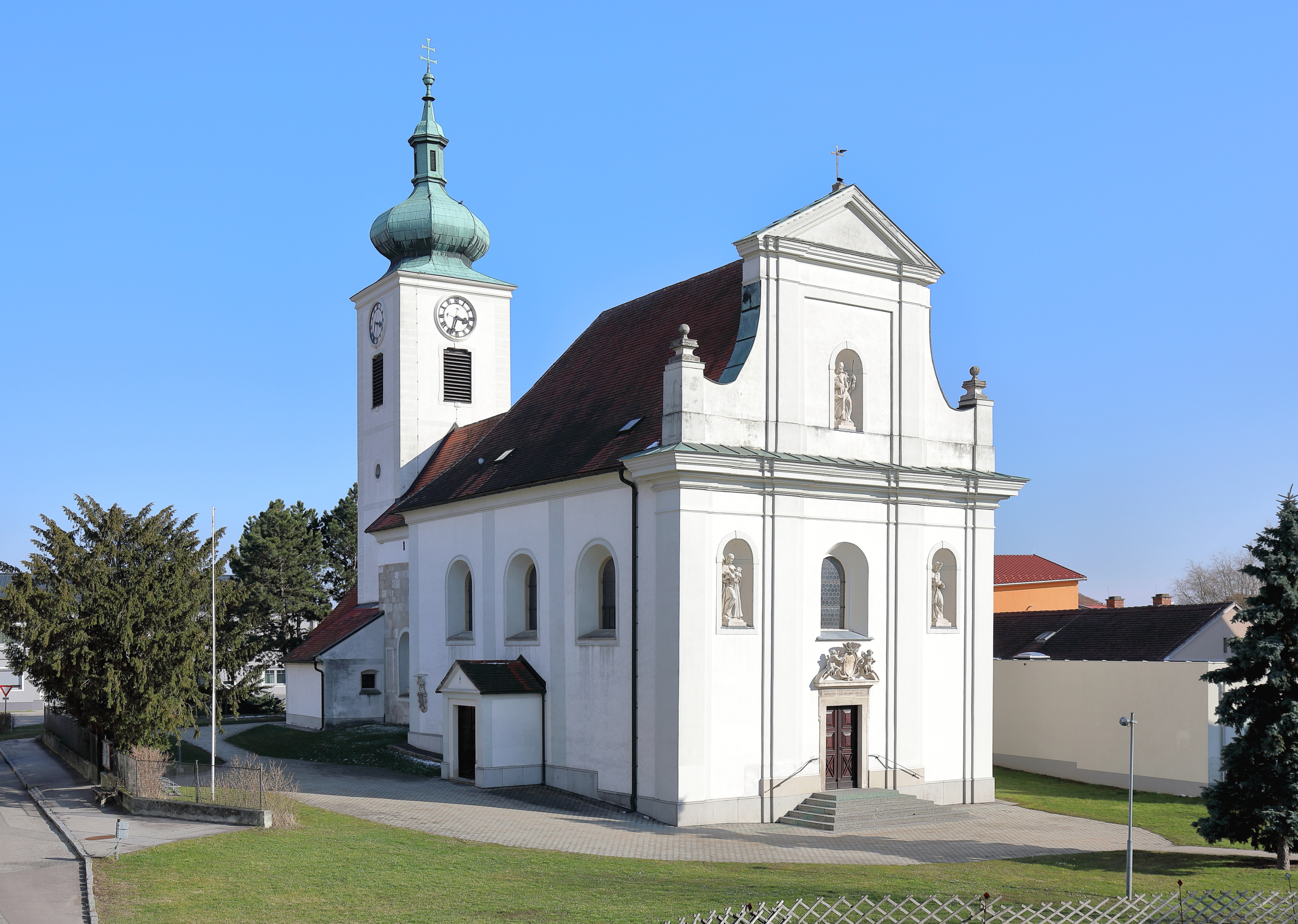 Nordwestansicht der röm.-kath. Pfarrkirche hl. Thomas in der niederösterreichischen Marktgemeinde Enzersdorf an der Fischa. Eine romanische Chorturmkirche mit einem barocken Langhaus, das 1714/15 errichtet wurde.